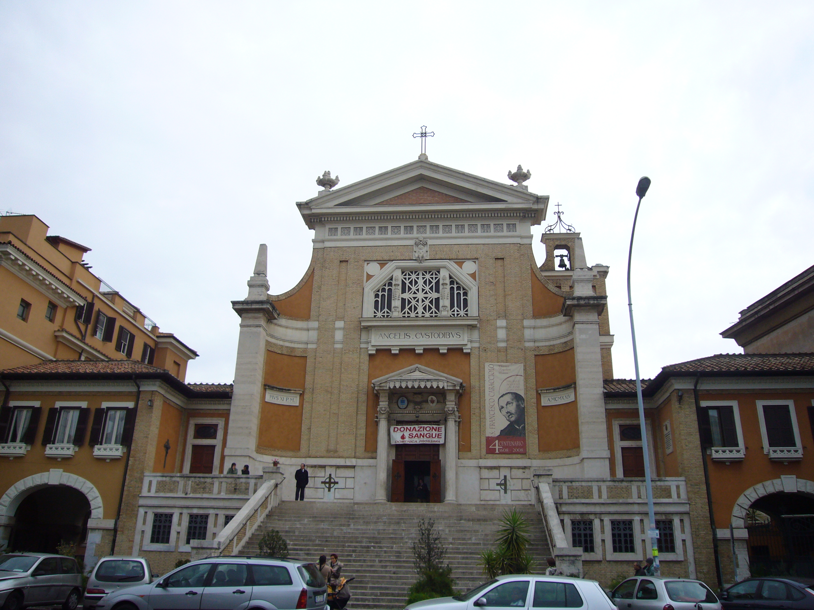 Roma, Monte Sacro: chiesa degli Angeli custodi a piazza Sempione